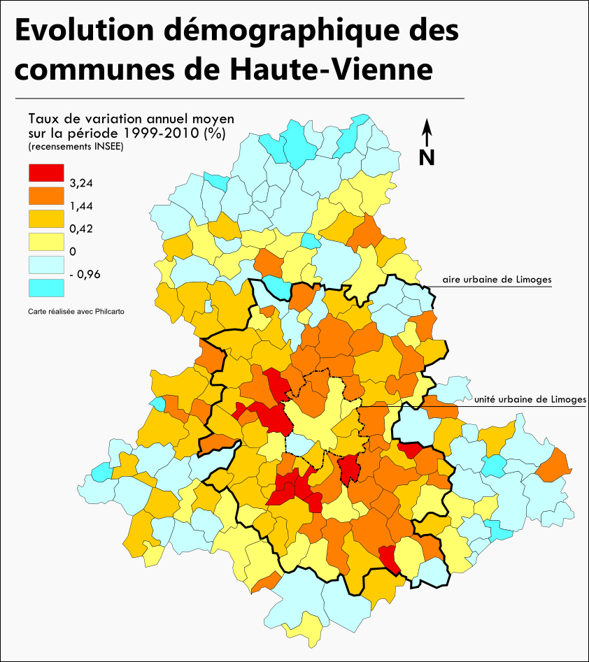 Carte de l'évolution de la population (taux annuel moyen) sur la période 1999-2010 (recensements INSEE), dans les communes du département de Haute-Vienne.